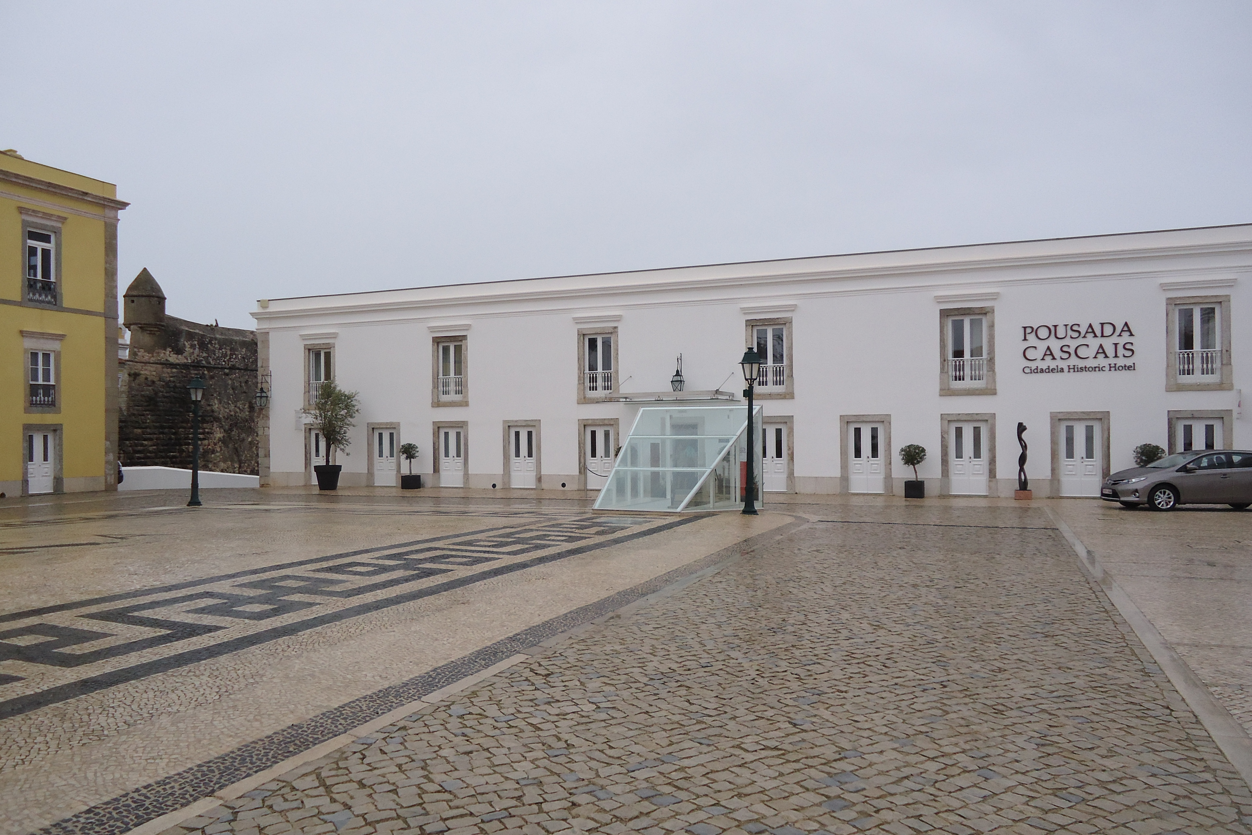 Cidadela de Cascais, freguesia de Cascais, distrito de Lisboa, Portugal: aspecto da Praça de Armas.